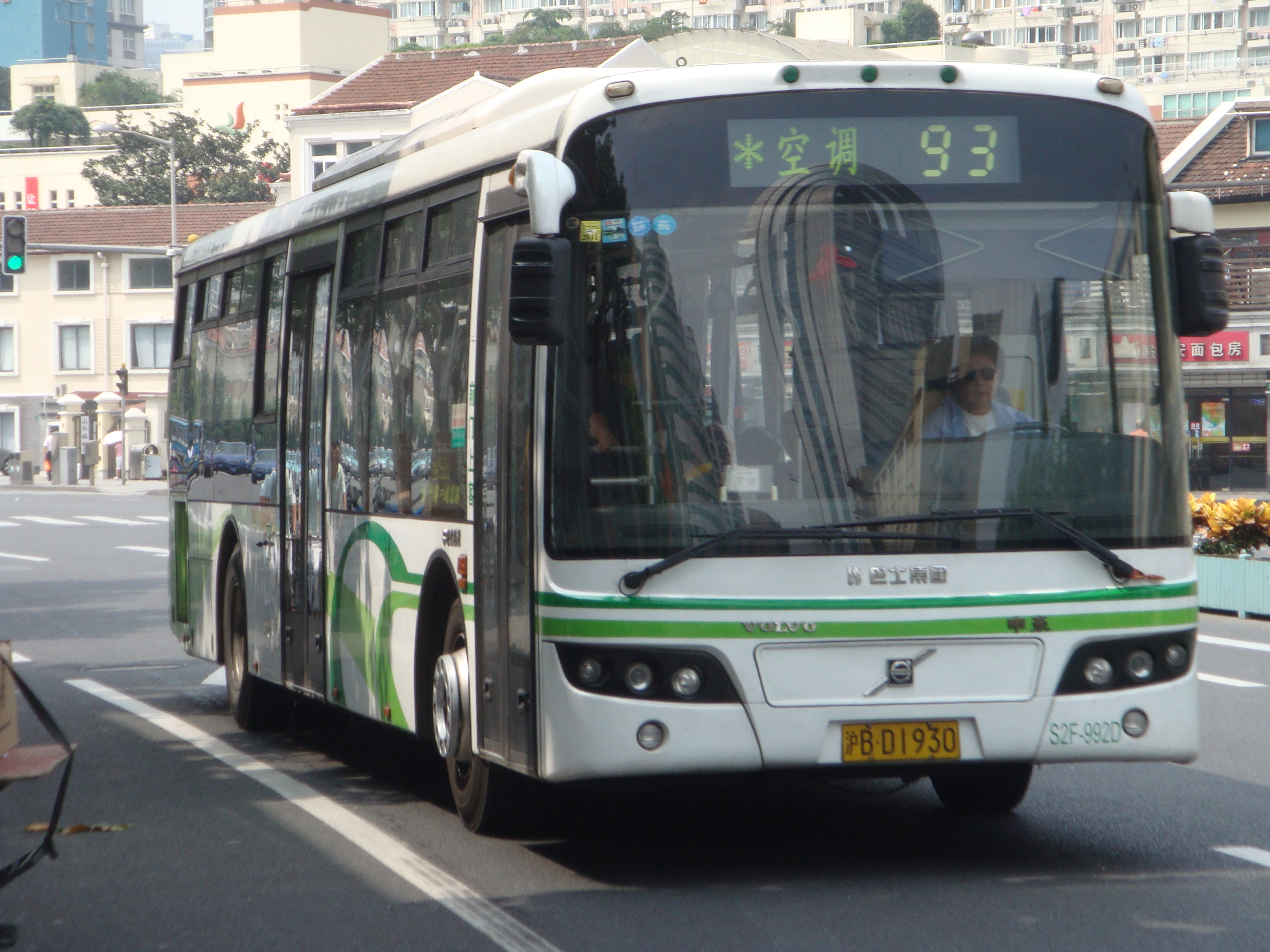 上海公交93路，自编号S2F-992D，车型SWB6120V4LE，摄于万航渡路愚园路。